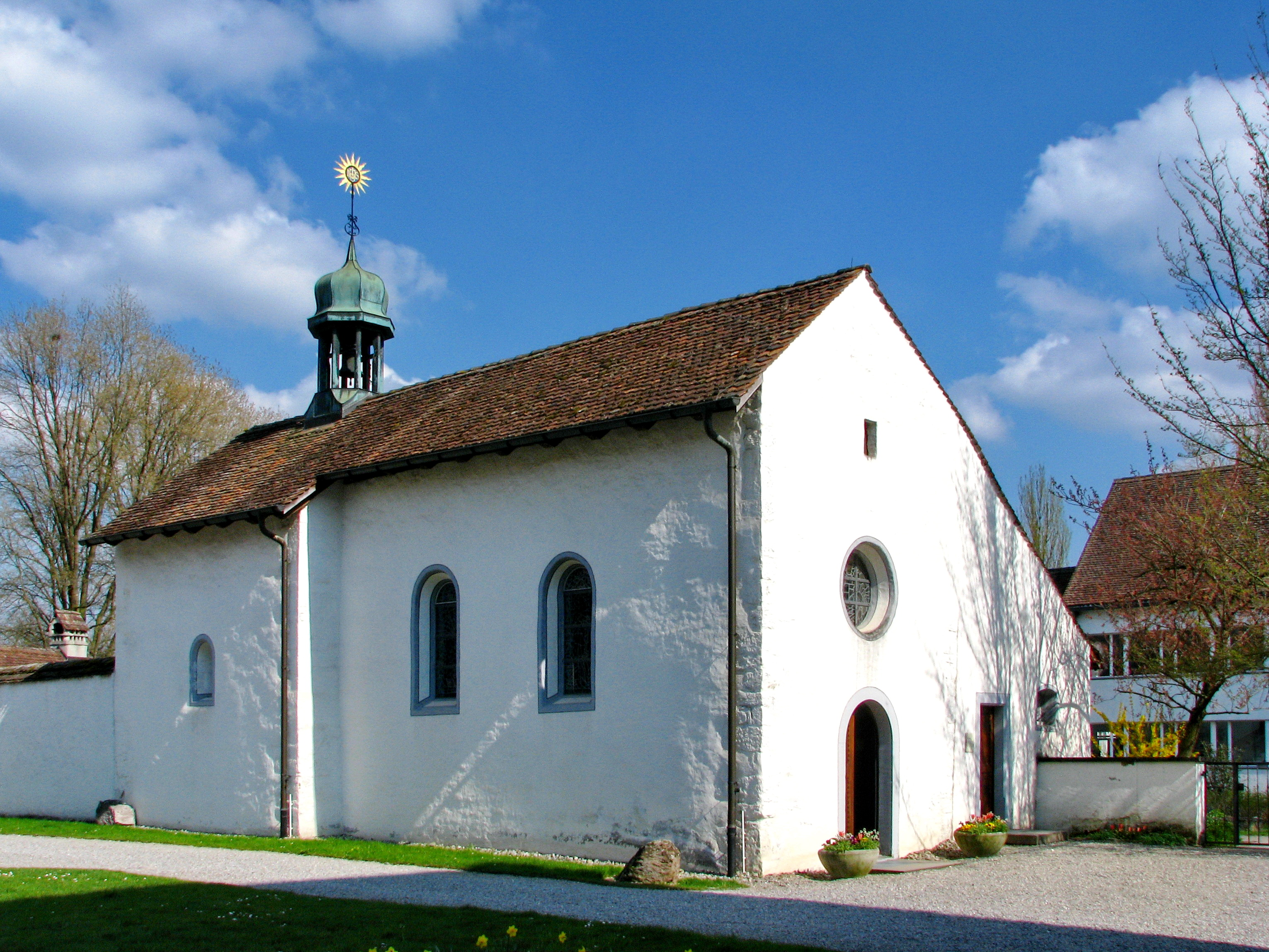 St. Anna Kapelle Kloster Fahr in Würenlos